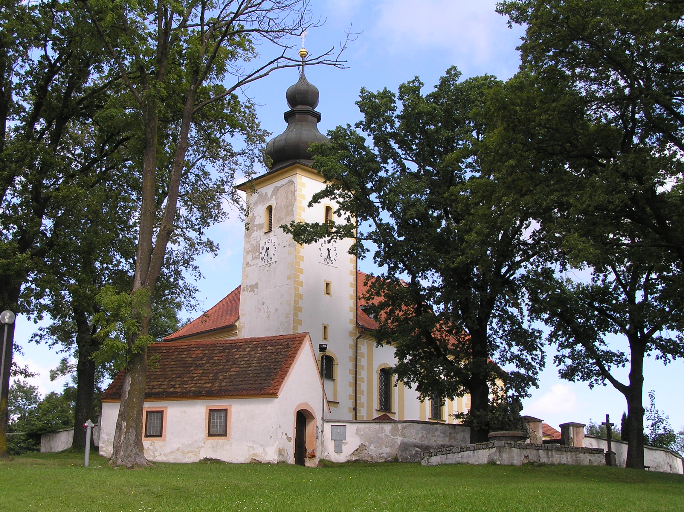 Kostel v Chrobolech